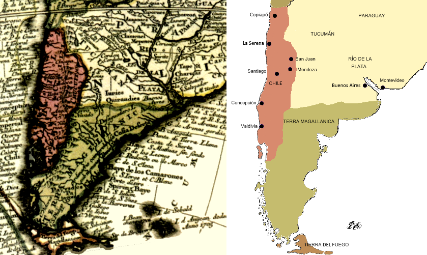 mapa interpretado sobre uno historico trabajo propio pruxo 2007